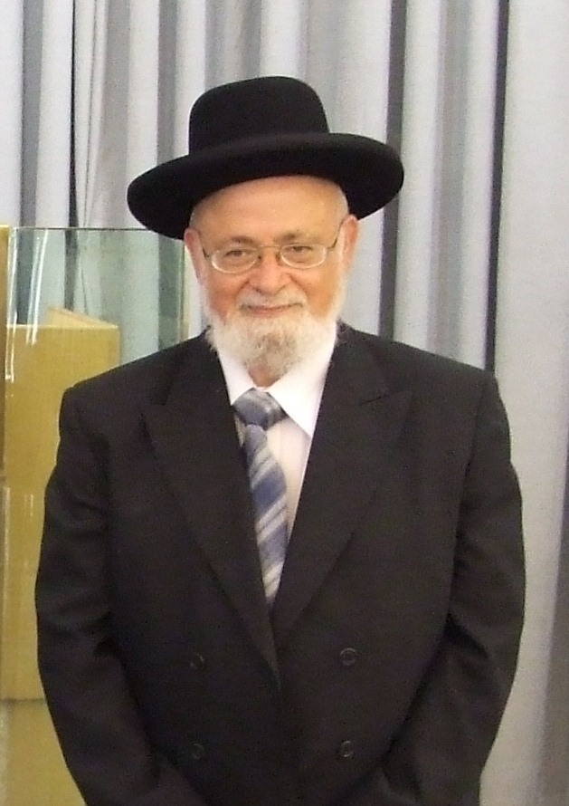 תמונתו של הרב ציון אלגרבלי